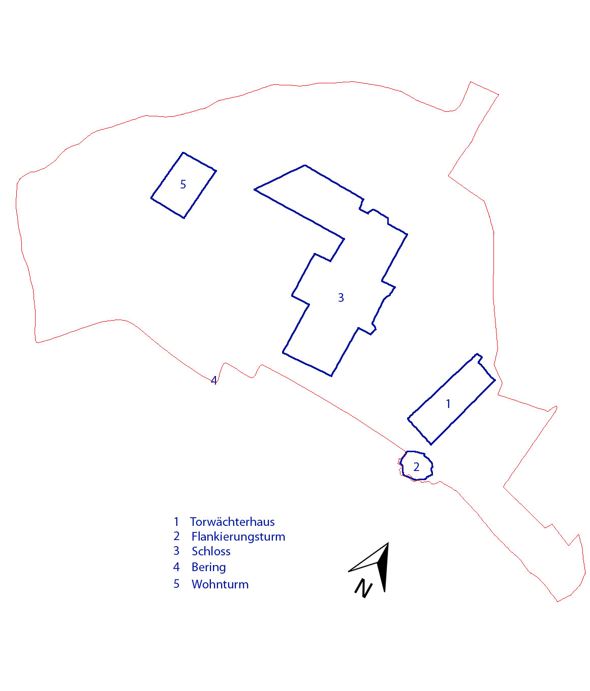 Lageübersicht Schloss Mutzschen, Landkreis Leipzig